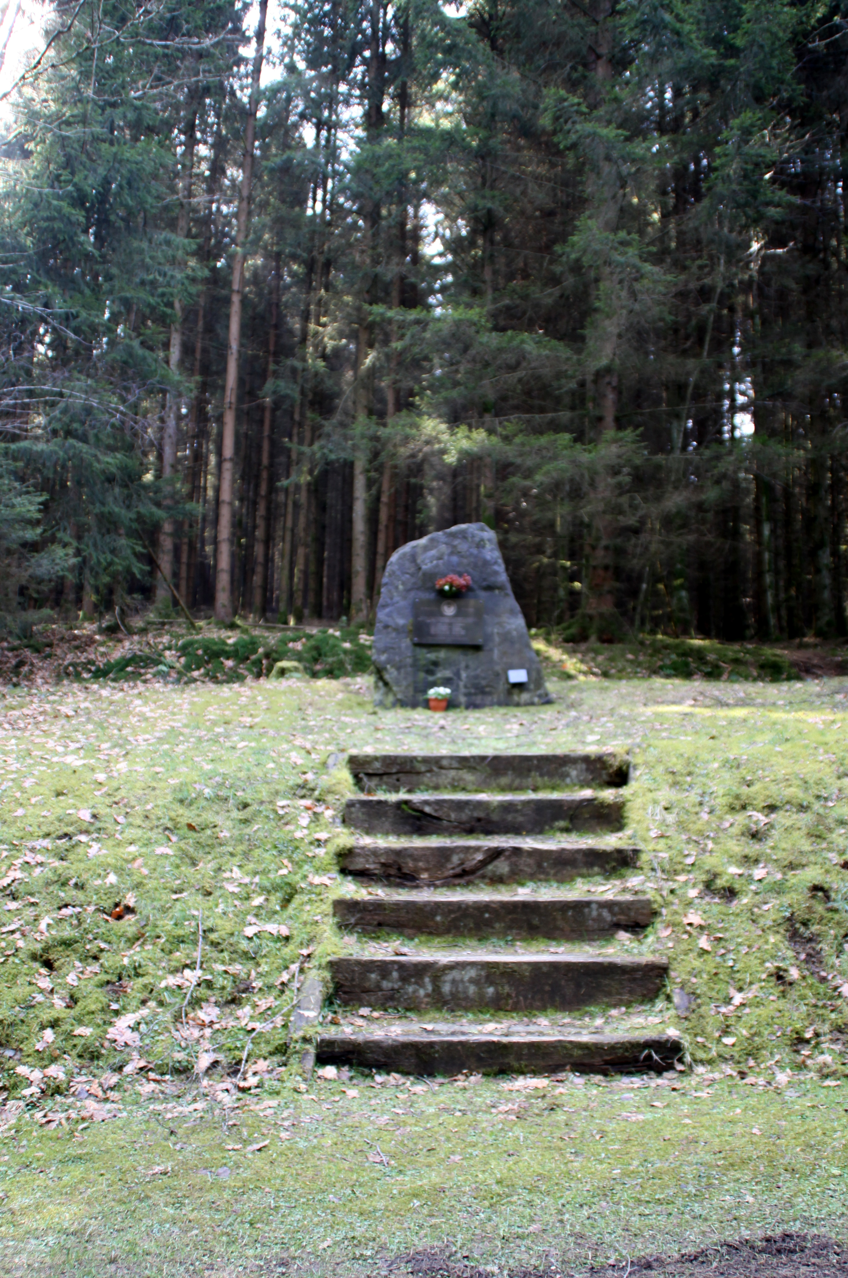 B-24 Monument bei Wibrin